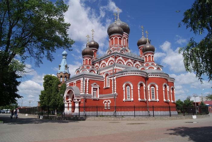 Собор в честь Воскресения Христова (1848) г. Борисов